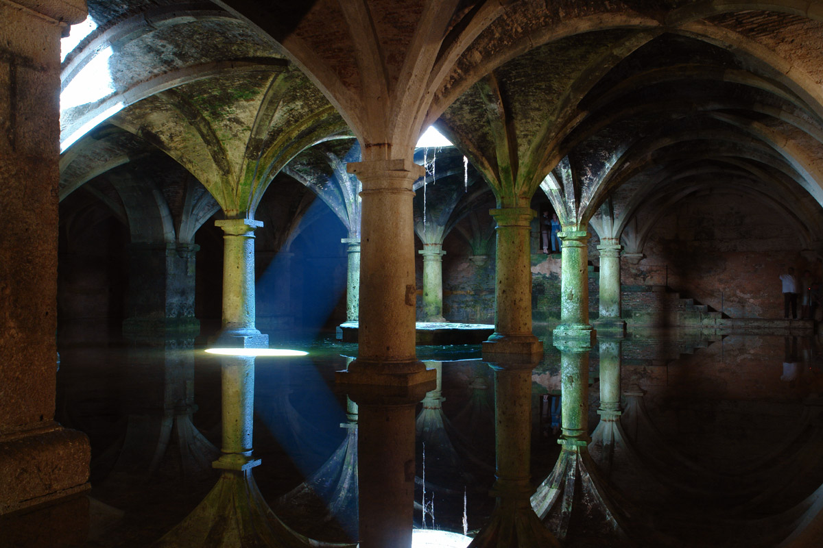 Эль-Джадида.Цистерны